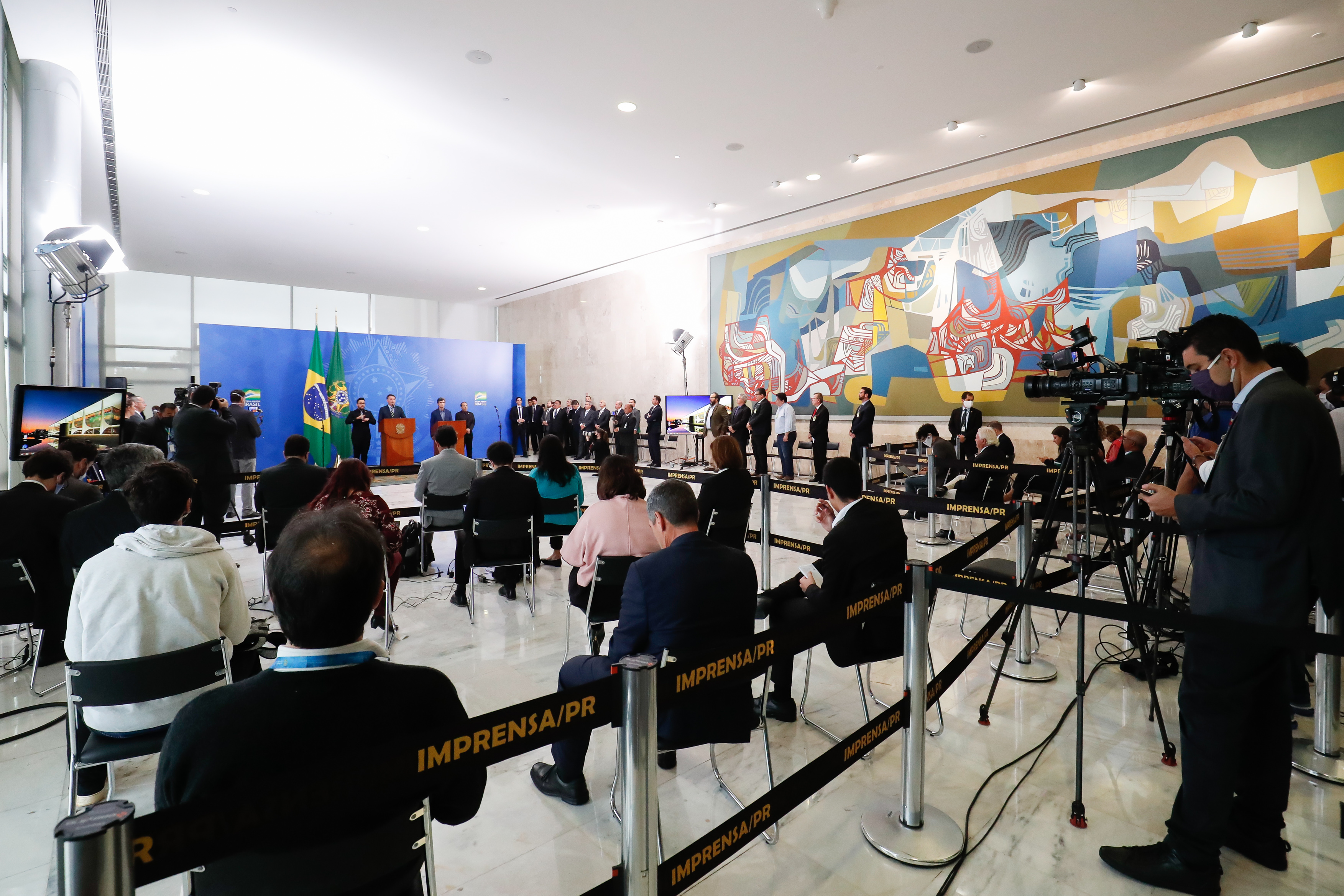 (Brasília - DF, 16/04/2020) Coletiva de Imprensa com o Presidente da República, Jair Bolsonaro. Foto: Alan Santos/PR